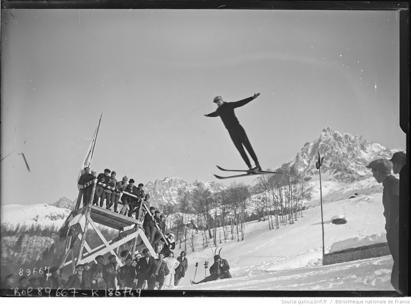 [Jeux olympiques d'hiver de] Chamonix, 2/2/24, Maardalen [saut à ski de l'épreuve du combiné nordique] : [photographie de presse] / [Agence Rol]